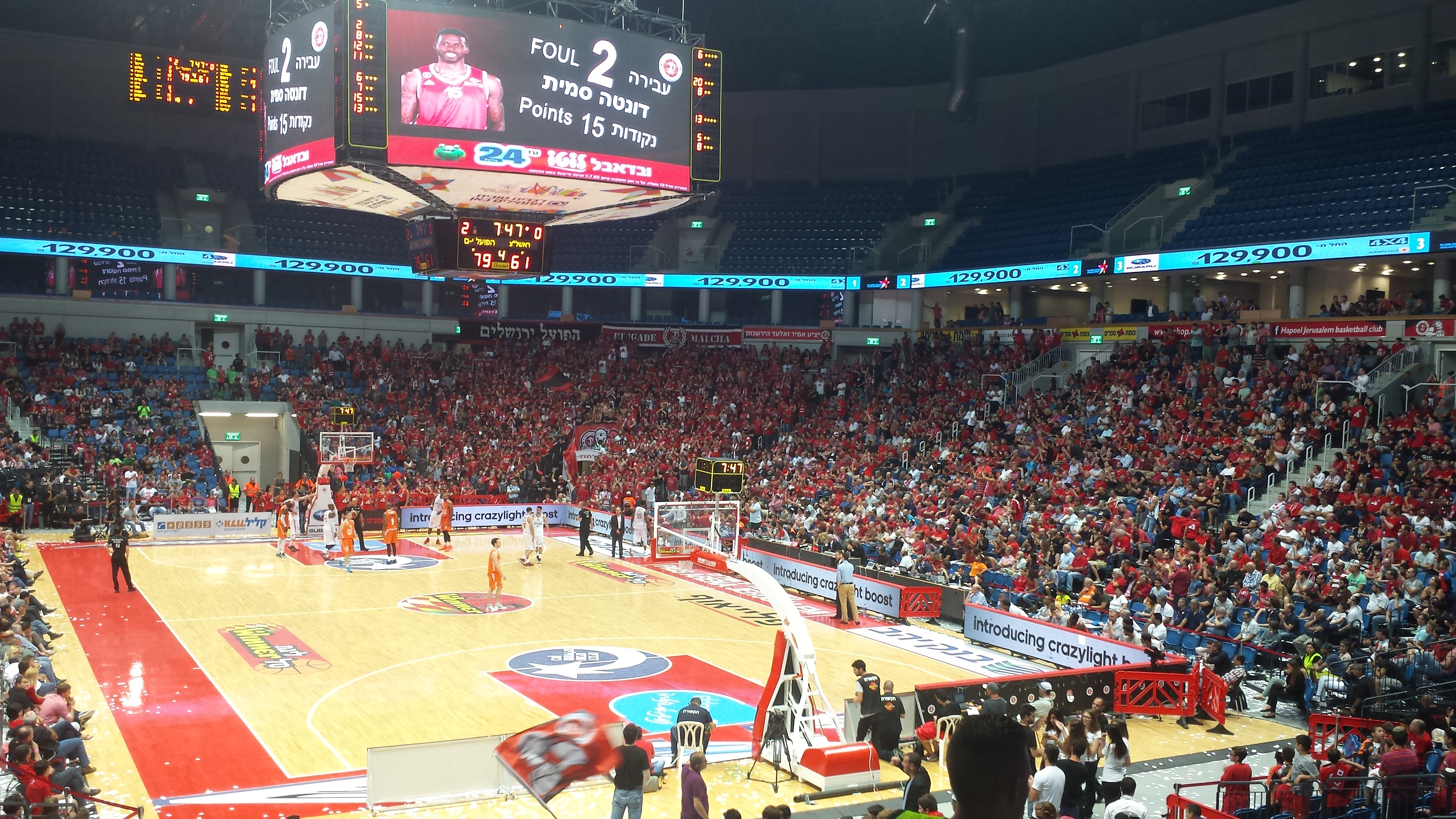 תמונה הפיס ארנה בירושלים בזמן משחק פלייאוף בין הפועל ירושלים למכבי ראשון לציון. מבט מיציע